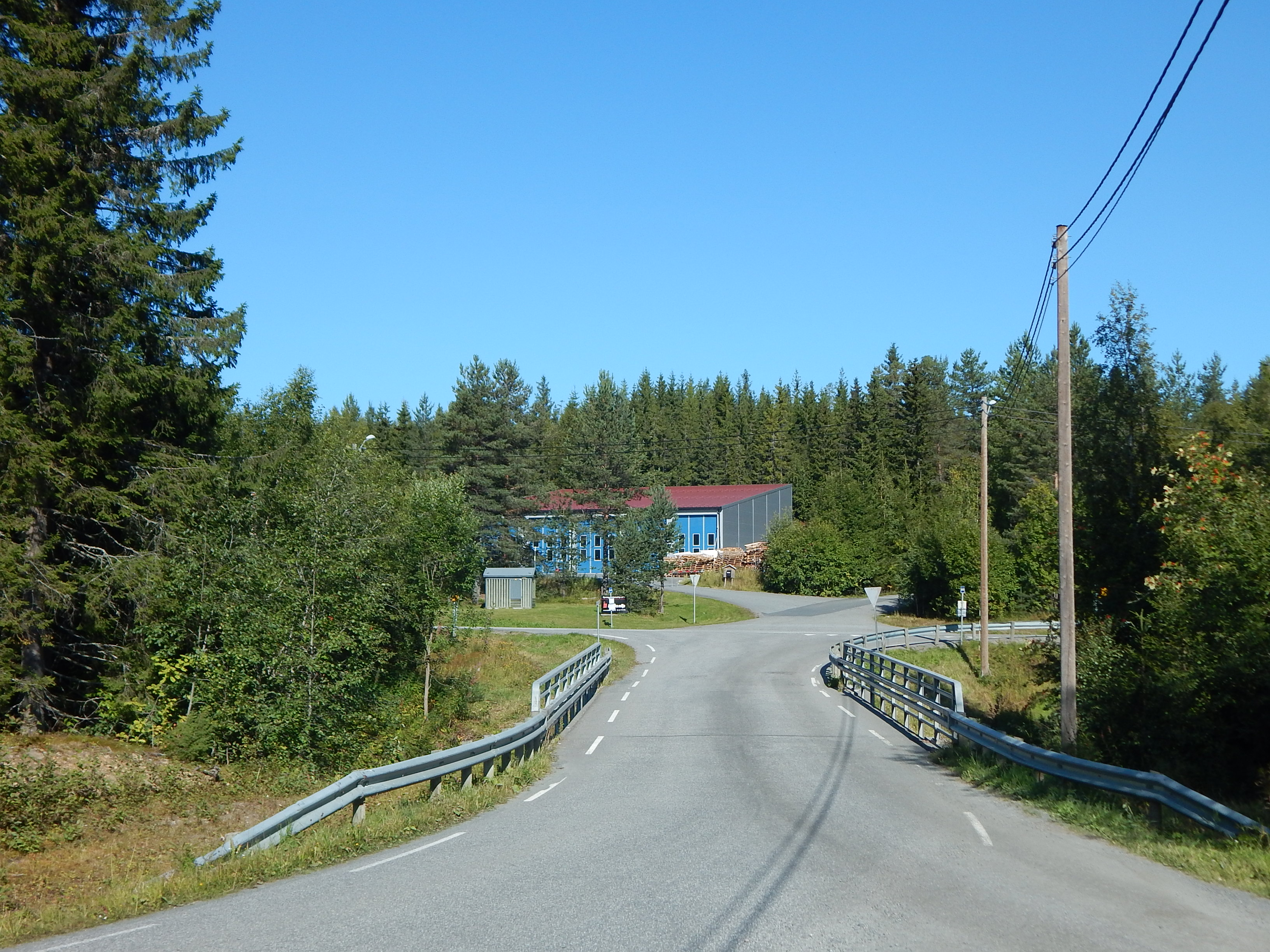 Skonhovdvegen (fylkesvei 2400, tidl. 149) mot nord, med Odnesvegen i bakgrunnen, ved Bybrua